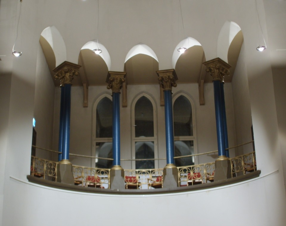 Wuppertal, Immanuelskirche, Empore über Apsis